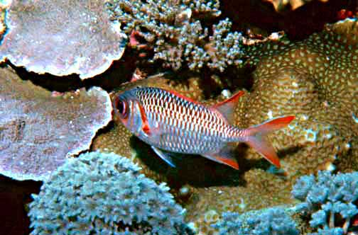 Myripristis violacea (Syn. Myripristis violaceus)